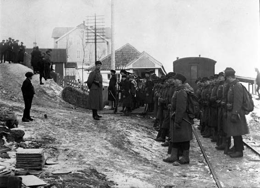 Sulitjelma affair is for future designation of a conflict between workers and police in the mining community Sulitjelma in 1918. The sheriff was prevented when he would apprehend one of the miners, and it all evolved over time to campaigns by armed soldiers, political strife - and prison sentences for several.